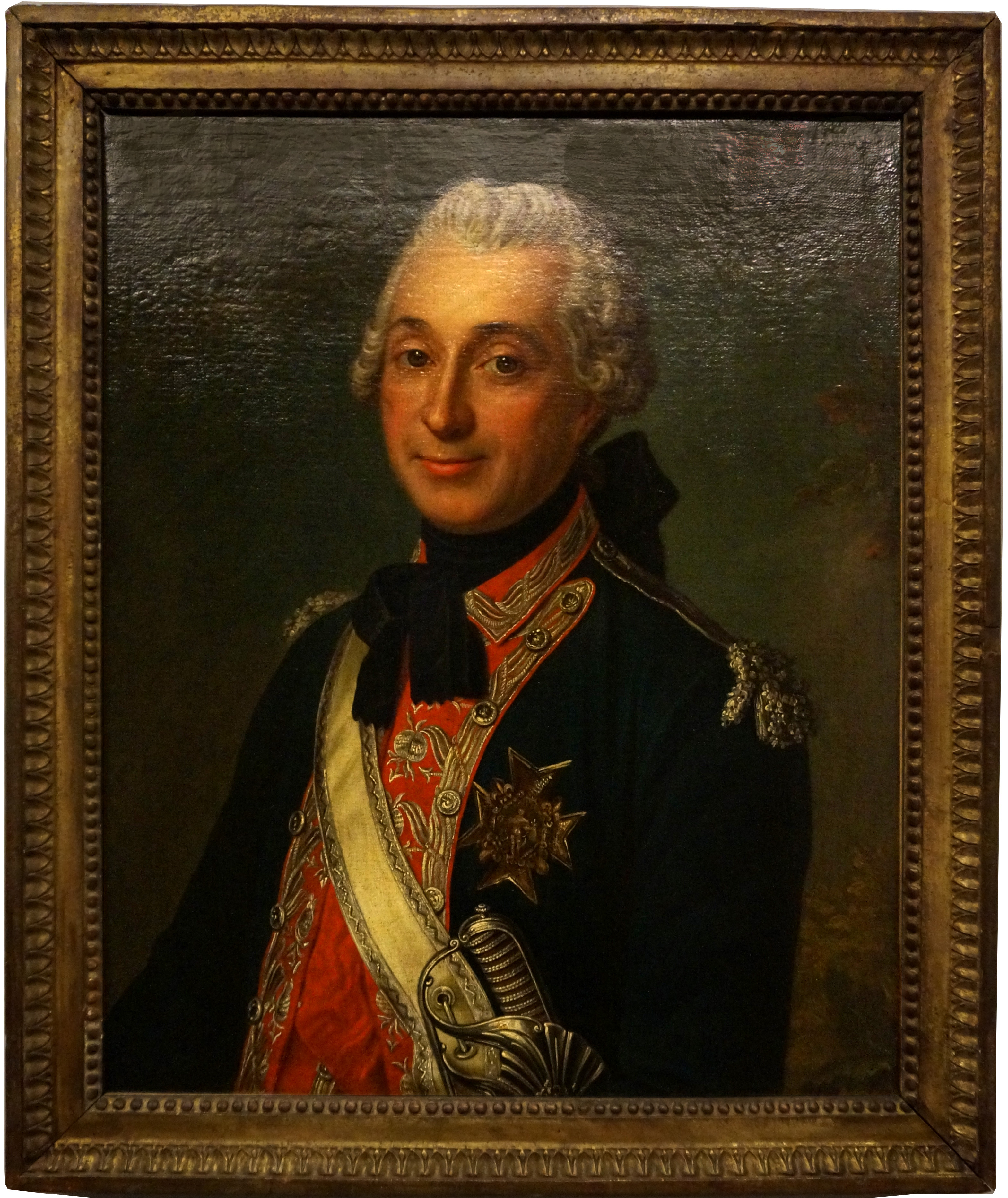 Peinture présentée au musée d el'armée.